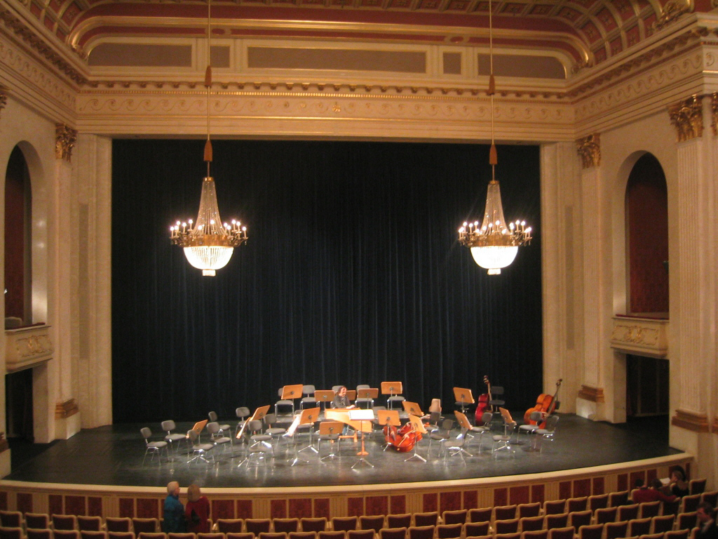 Staatsoper Unter den Linden, Bühne vor einem Konzert